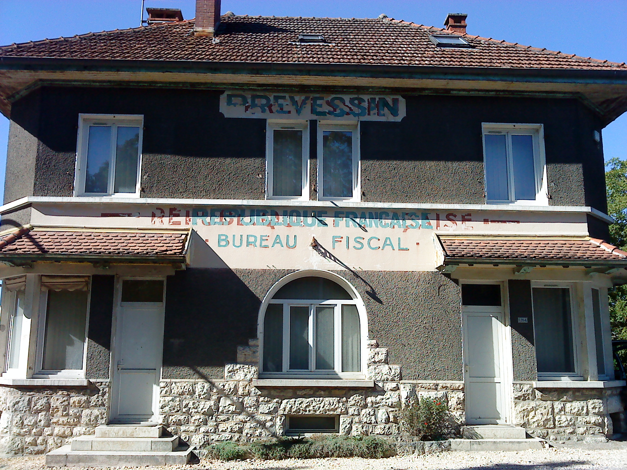 Ancien bureau fiscal de Mategnin à Prévessin-Moëns, Ain, France.